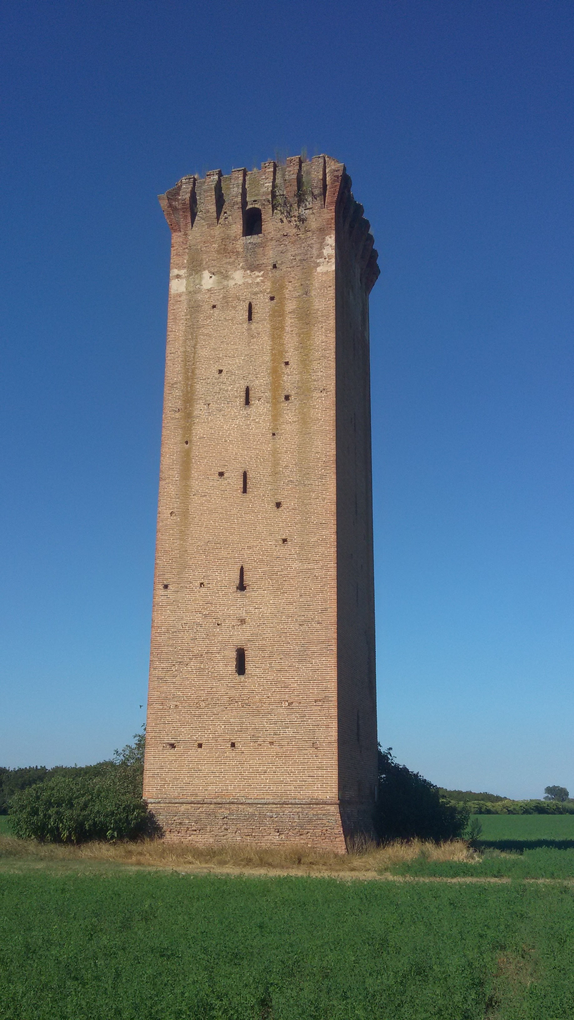 Torre di Tieni, torre difensiva medievale, con funzioni anche doganali, eretta dagli Estensi in difesa dagli attacchi dei Veneziani